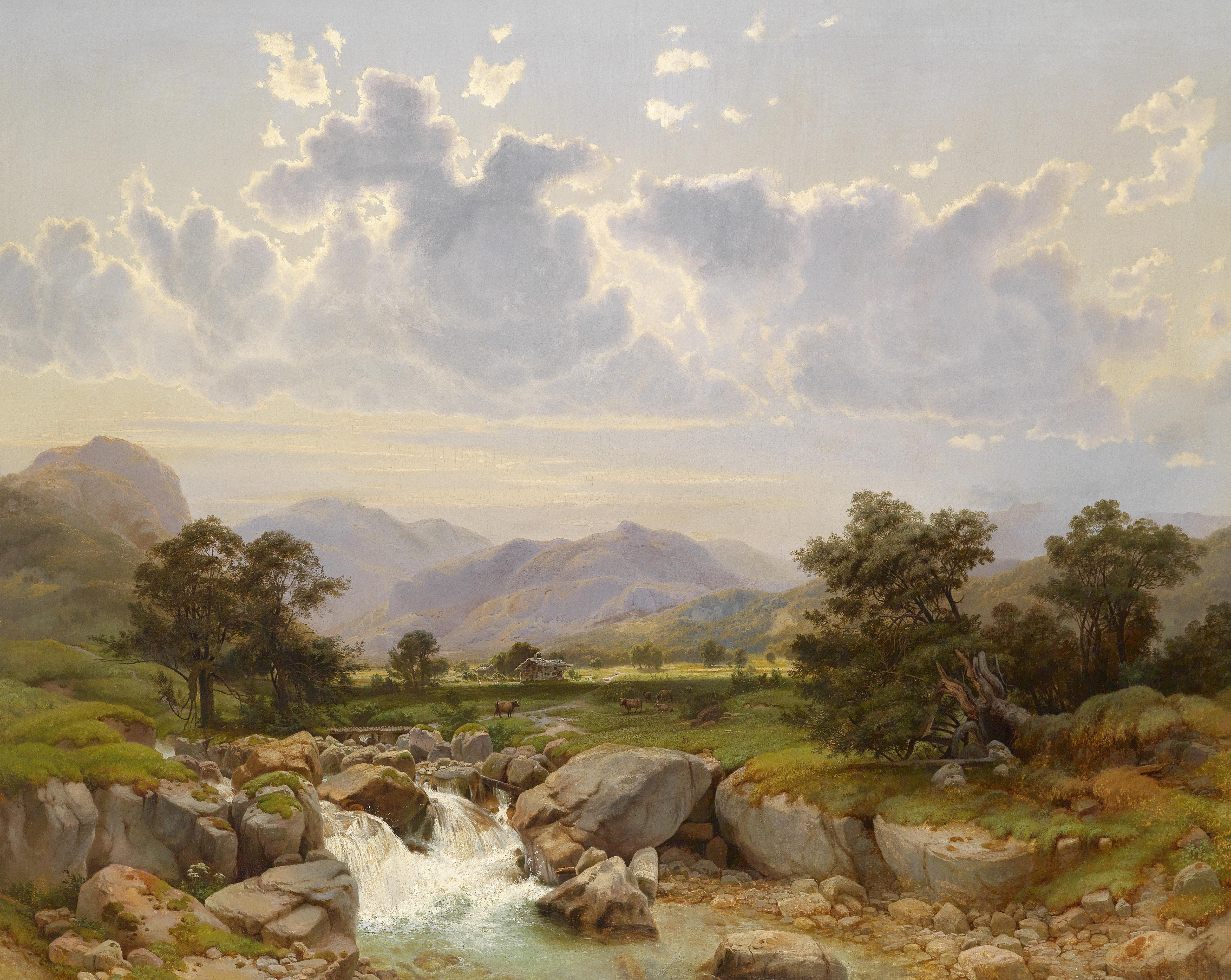 Landschaft bei Abtenau Salzkammergut, signiert und datiert J. Rose 1861, Öl auf Leinwand, 111 x 140 cm